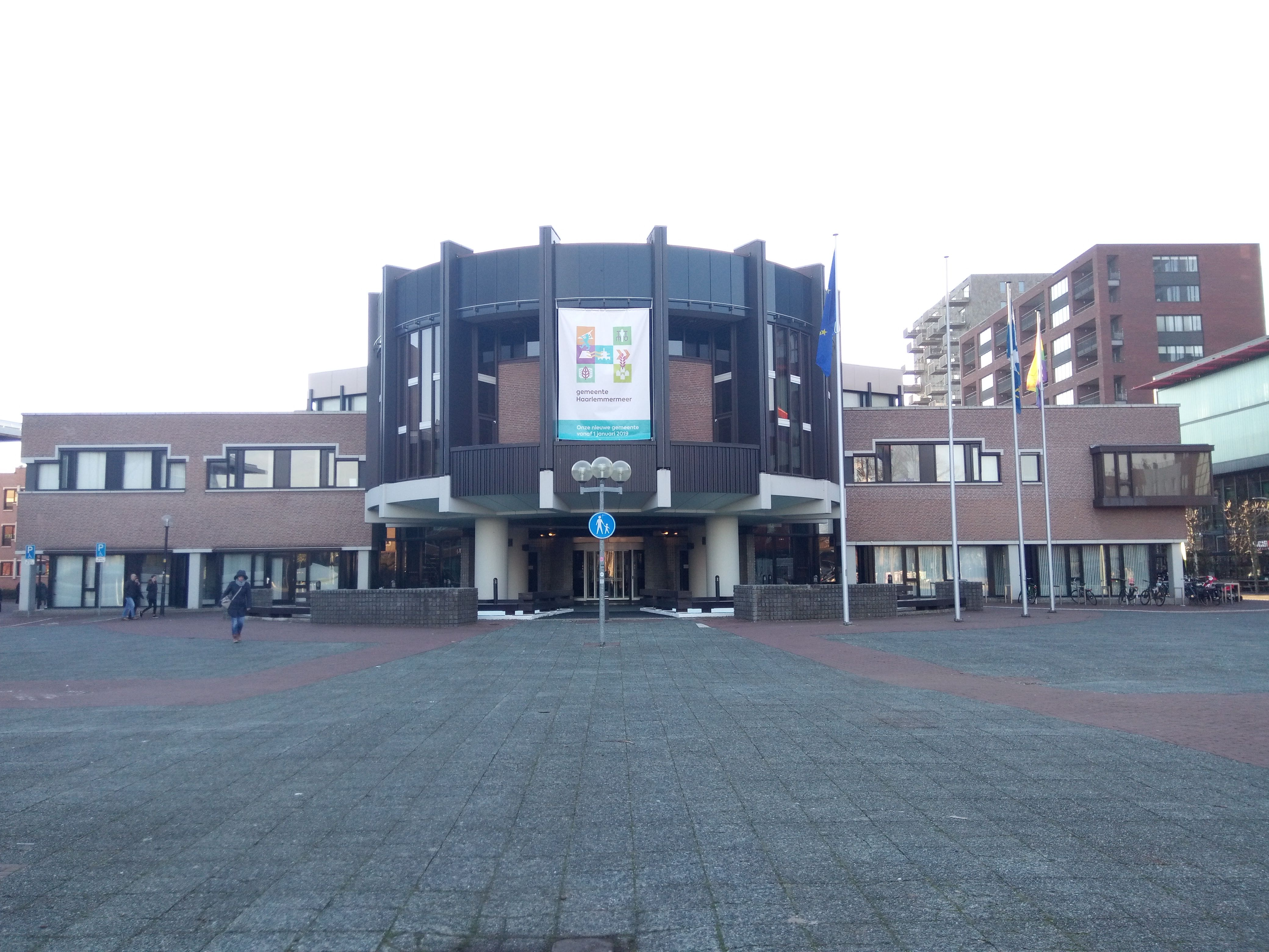 Vooraanzicht van het raadhuis in Hoofddorp, gemeente Haarlemmermeer